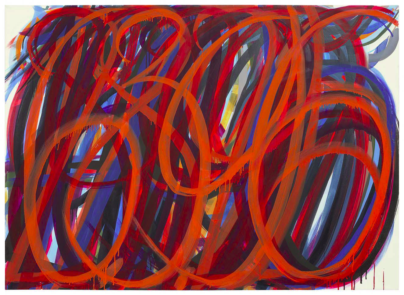 Öl auf Leinwand ohne Titel 1996 - aus dem Jahr 1996 100x140cm